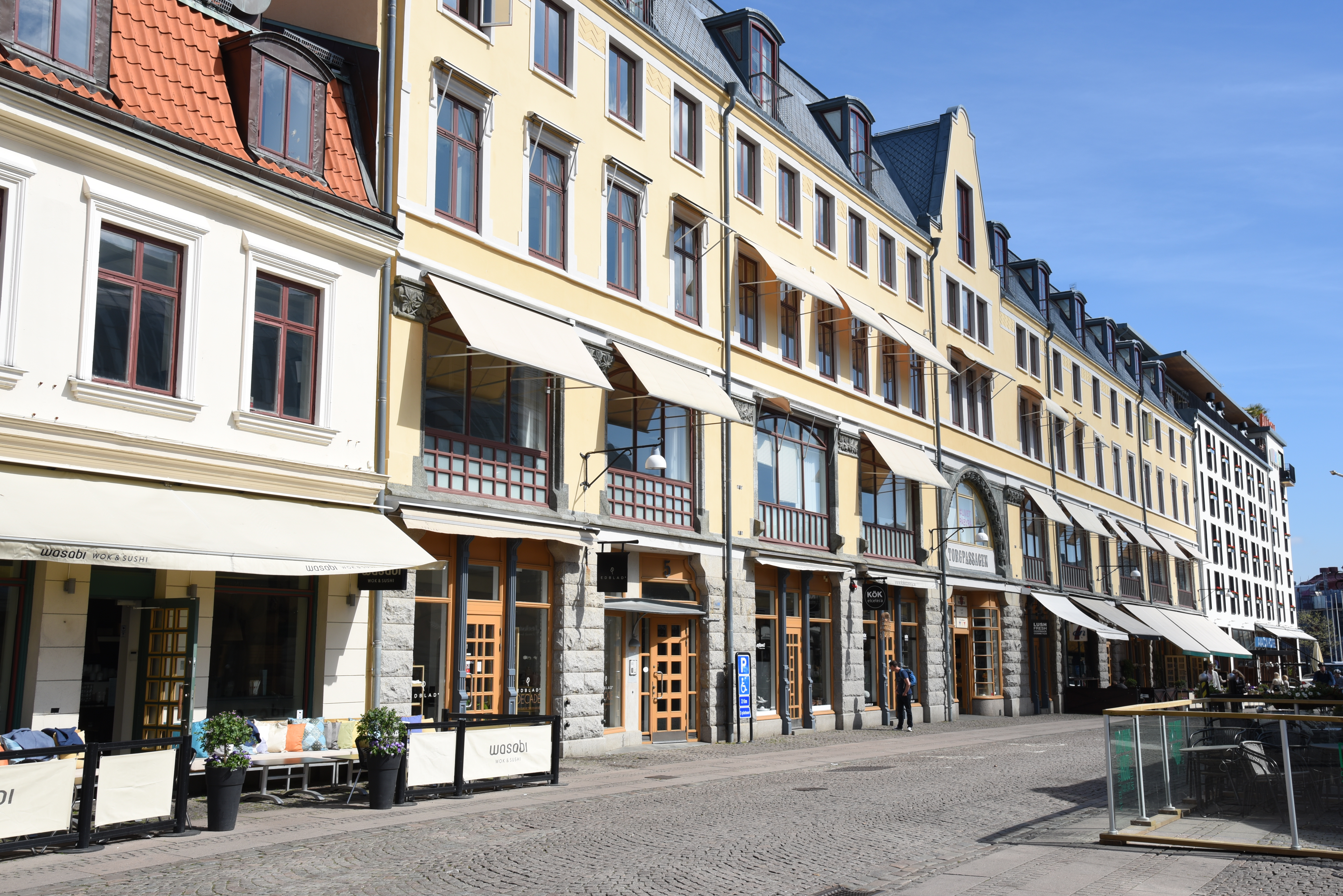 Kungstorget 4-9 i kvarteret Idogheten i stadsdelen Inom Vallgraven i Göteborg. Byggnaden i mitten är nummer 5-7 med Torgpassagen och Ölhallen 7:an.